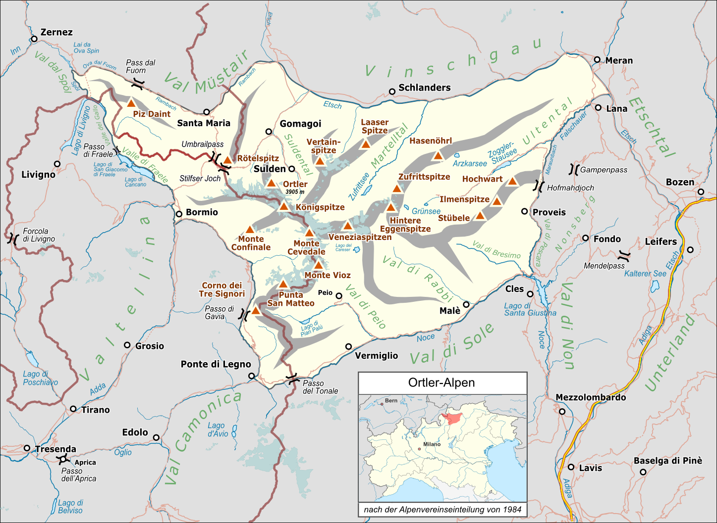 Ortler-Alpen nach der Alpenvereinseinteilung von 1984.